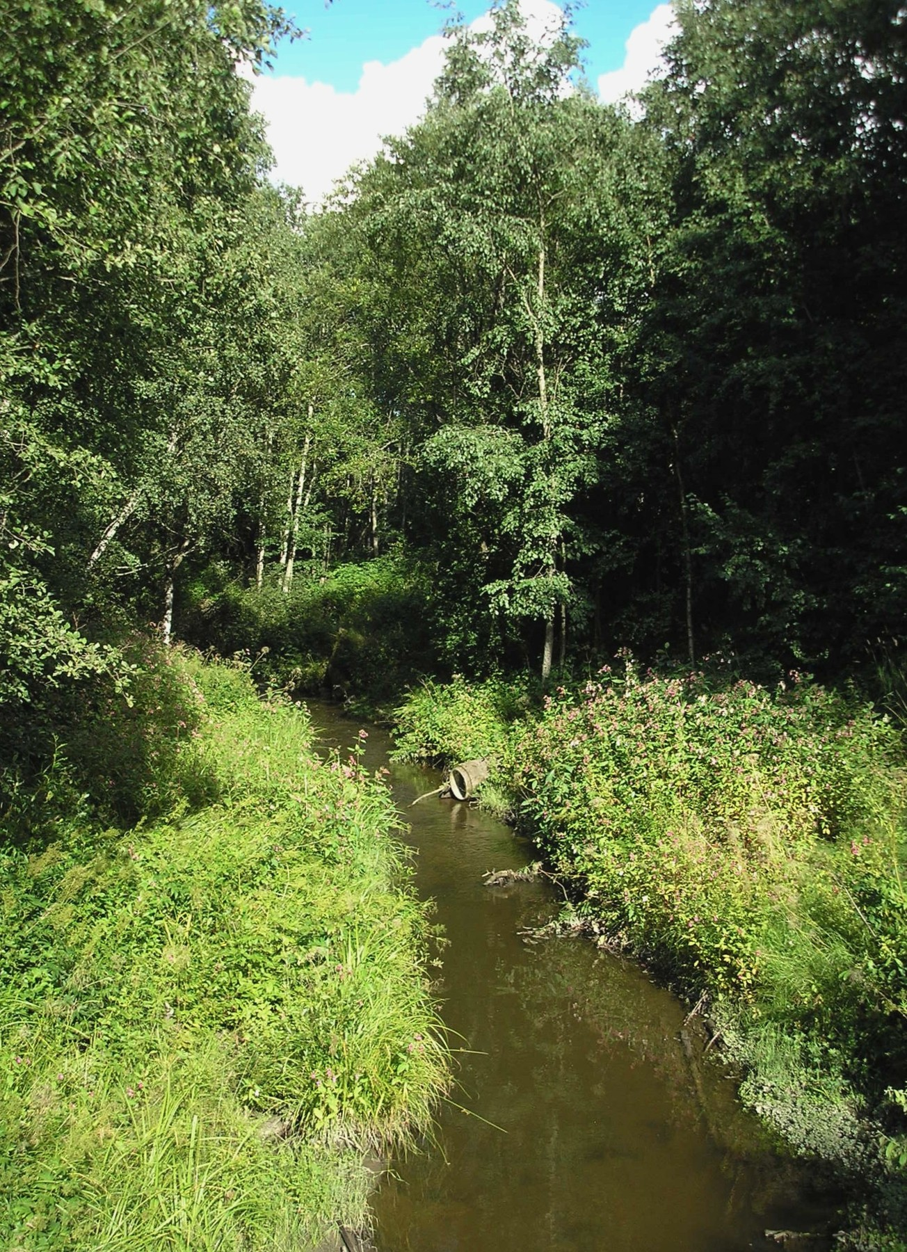 Koskuenkolu, pieni viherkaistale Nekalassa, Tampereella. Näkymä Vihiojan ylittävältä puusillalta ylävirtaan.